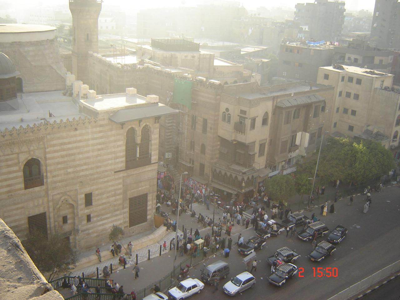 Mosquée du Sultan Al-Achraf Qansuh Al-Ghouri au Caire